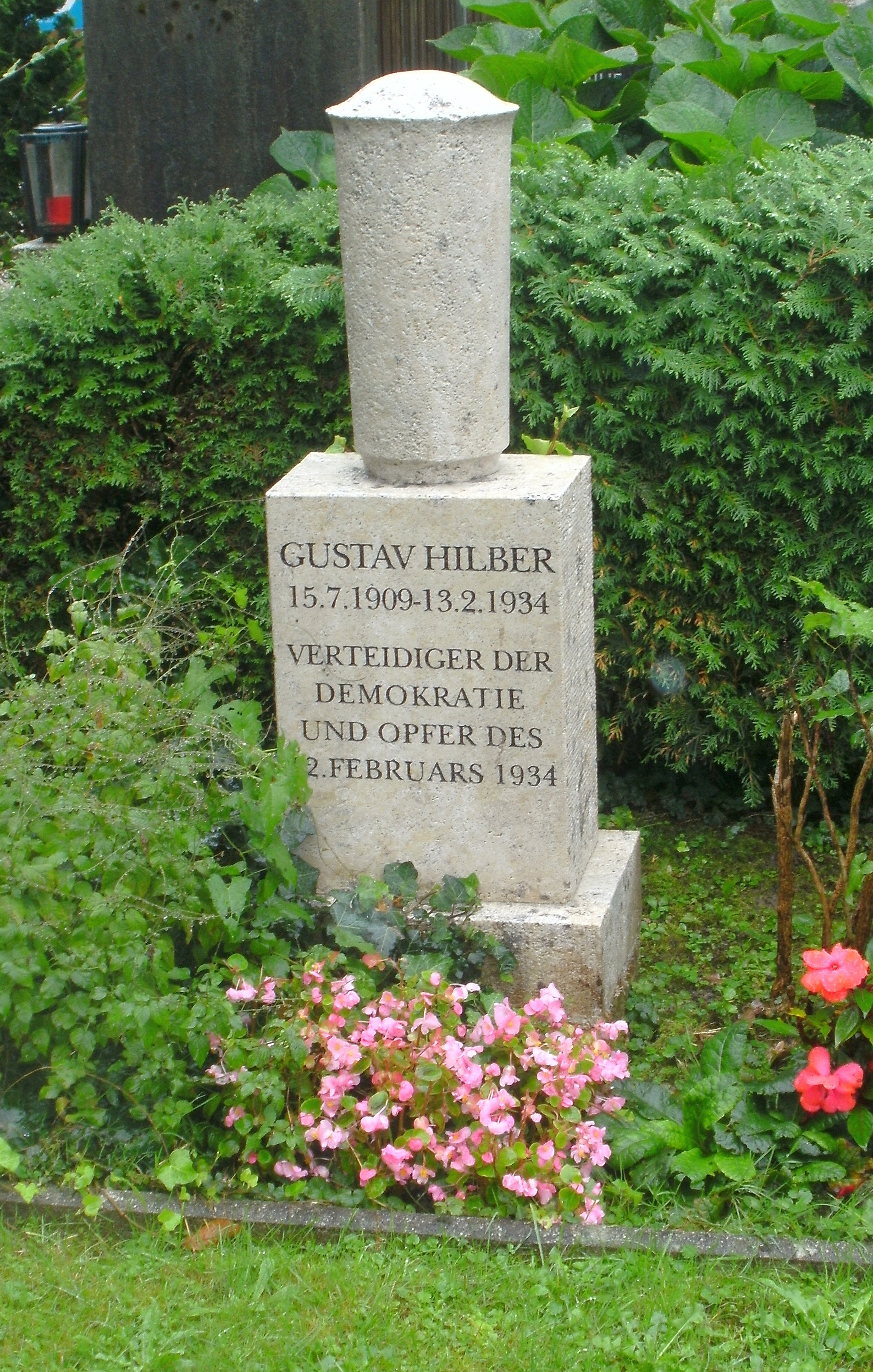 Steyr, Oberösterreich: Urnenfriedhof am Tabor, Grab von August "Gustav" Hilber (1909-1934)